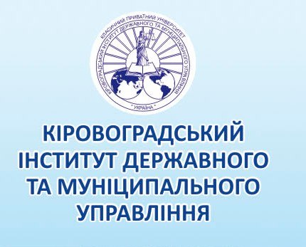 КІДМУ КПУ